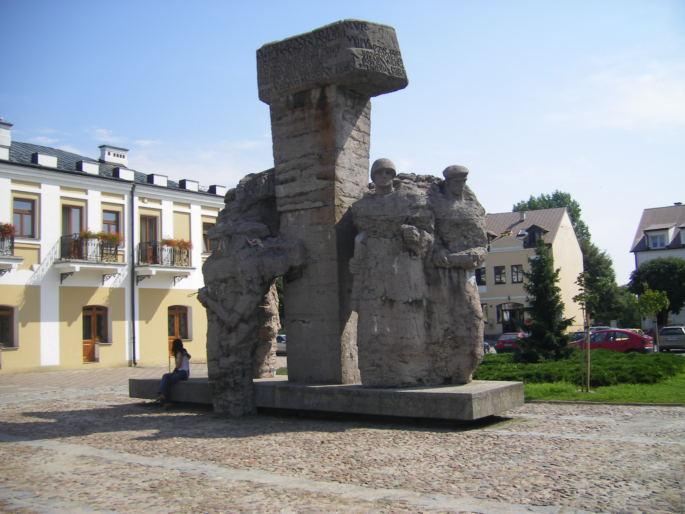 Włodawa, Main Square - Rynek